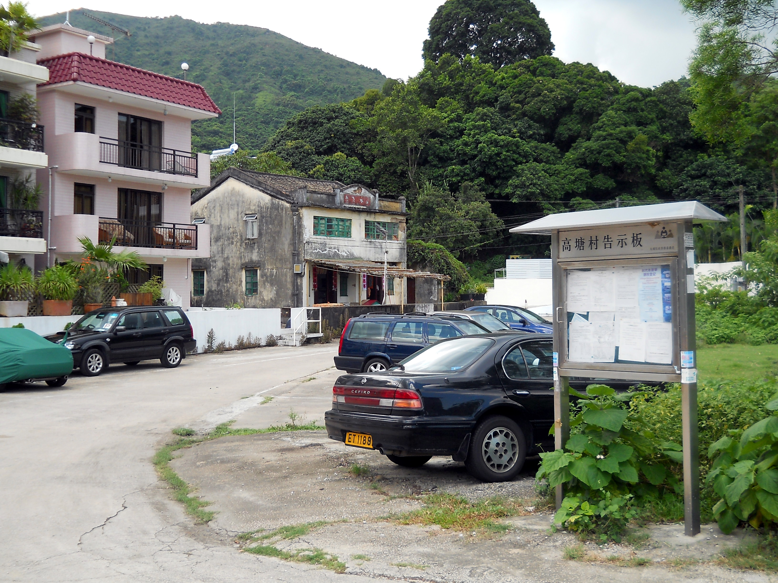 中文（香港）: 西貢高塘